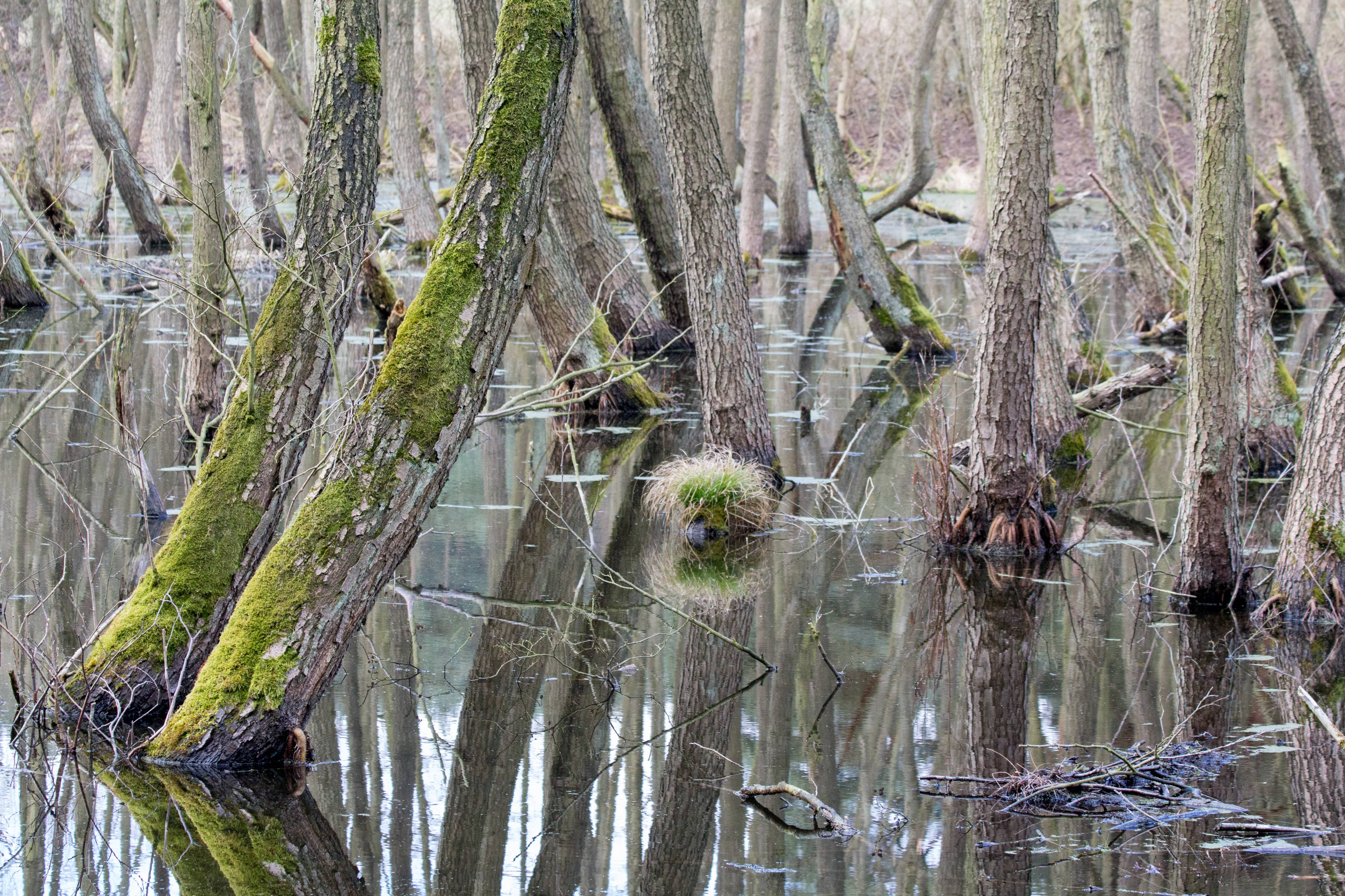 Waldteich im Naturschutzgebiet „Charlottenhöhe“ (Uckermark), der unter anderem Kranichen als Rückzugsort dient.